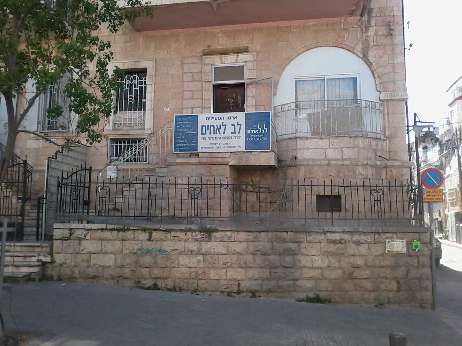 בית לב לאחים בירושלים